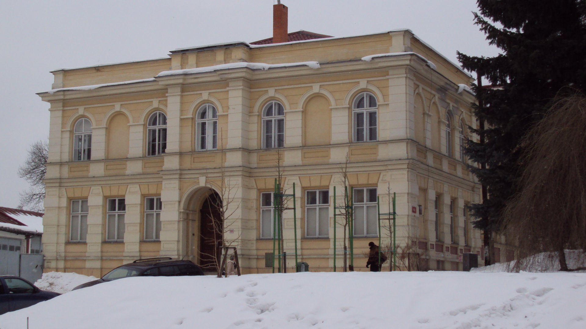 Tělocvična ZŠ Pátova